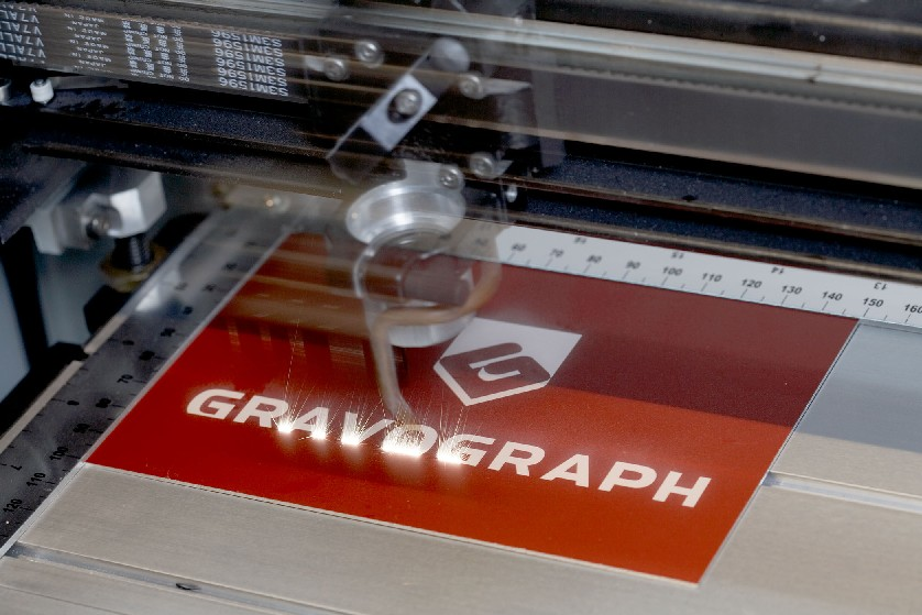 Laser merking på eloksert aliminium